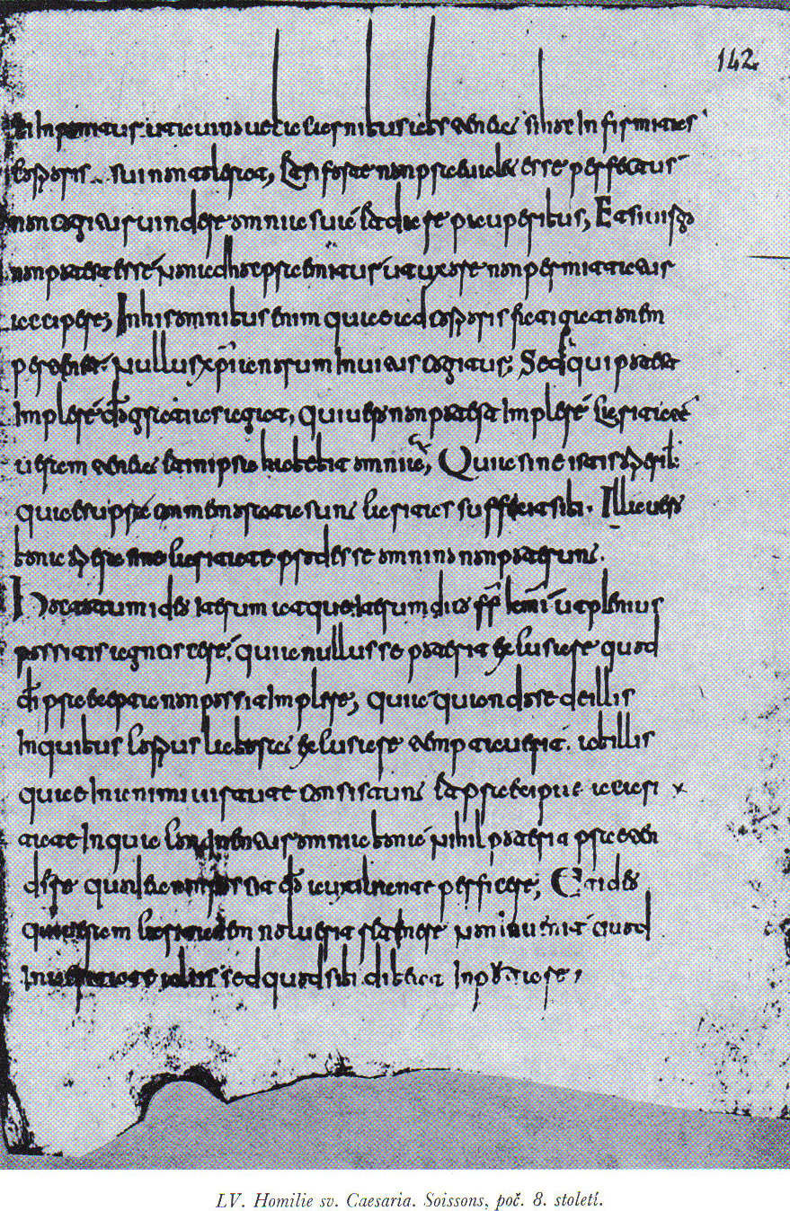 Česky: Ukázka Merovejské minuskuly tzv. Leutharova typu - Homilie sv. Caesaria